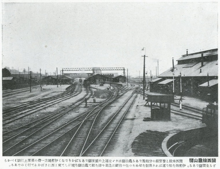 昭和初期(昭和4年=1929年以前)の亀山駅構内。